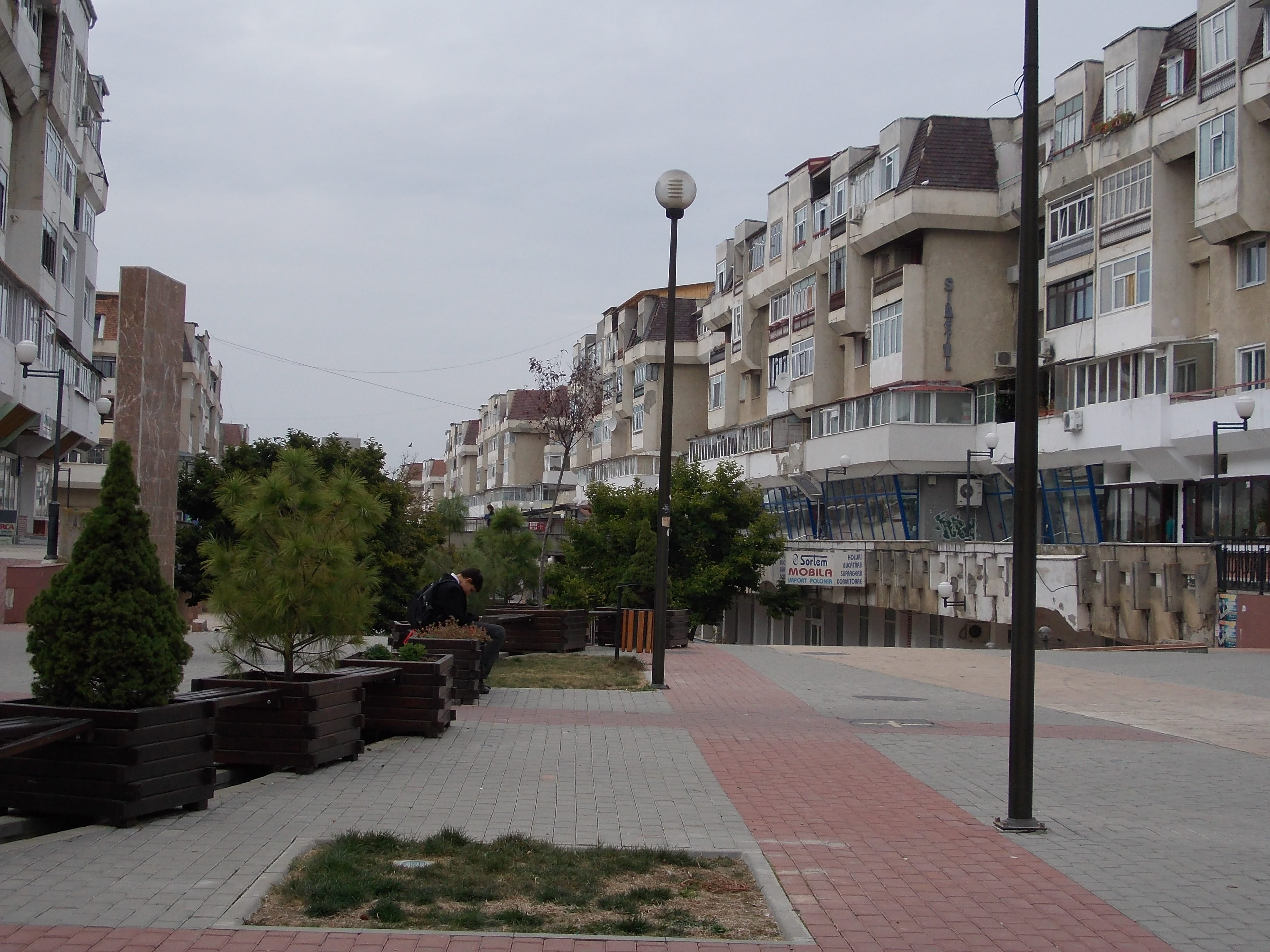 pietonalul